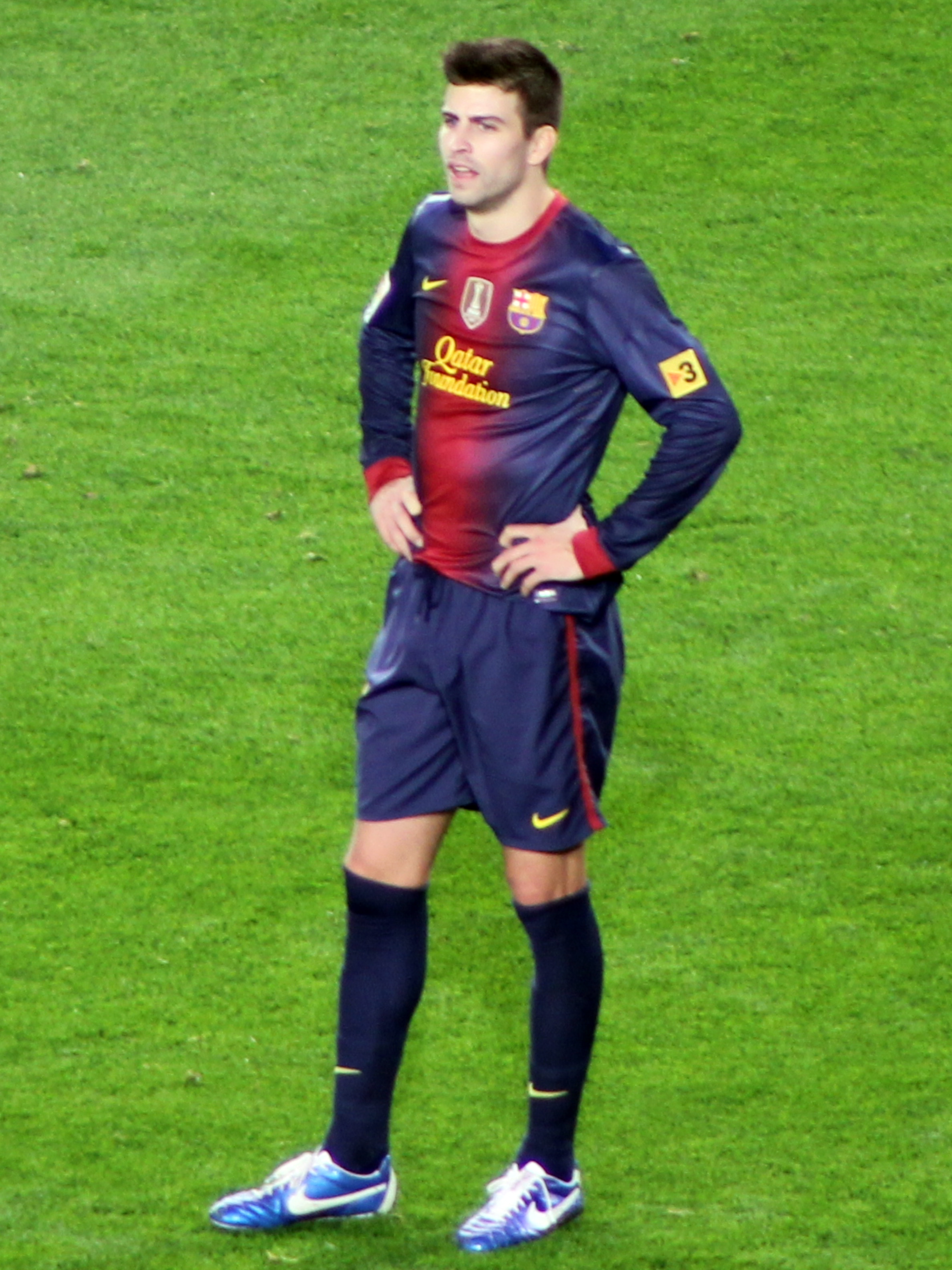 Foto realizada por Javier Segura (@castroquini en Twitter)